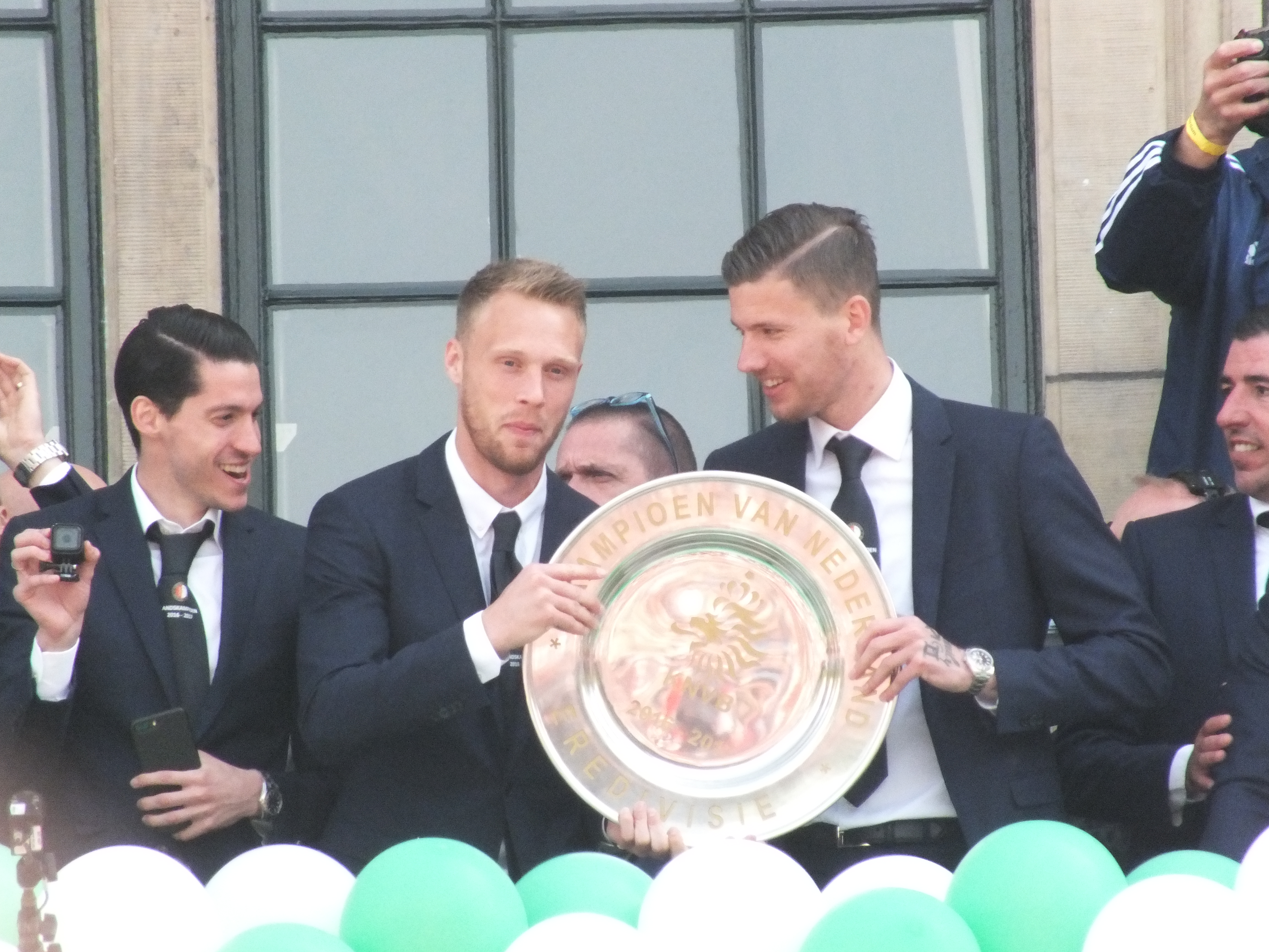 Nicolai Jørgensen met de gouden landskampioenschaal op de Coolsingel.